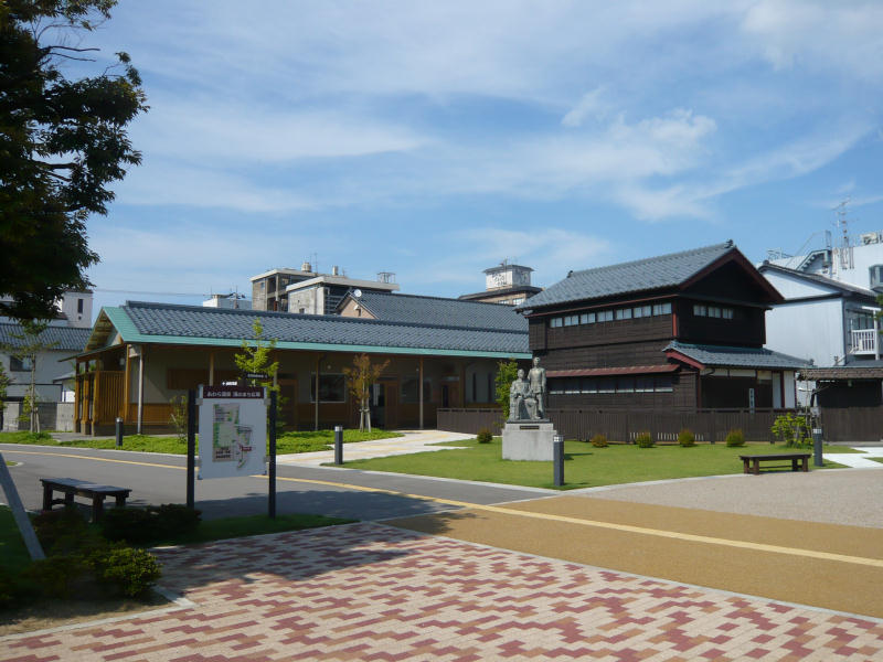 藤野厳九郎記念館。芦原温泉